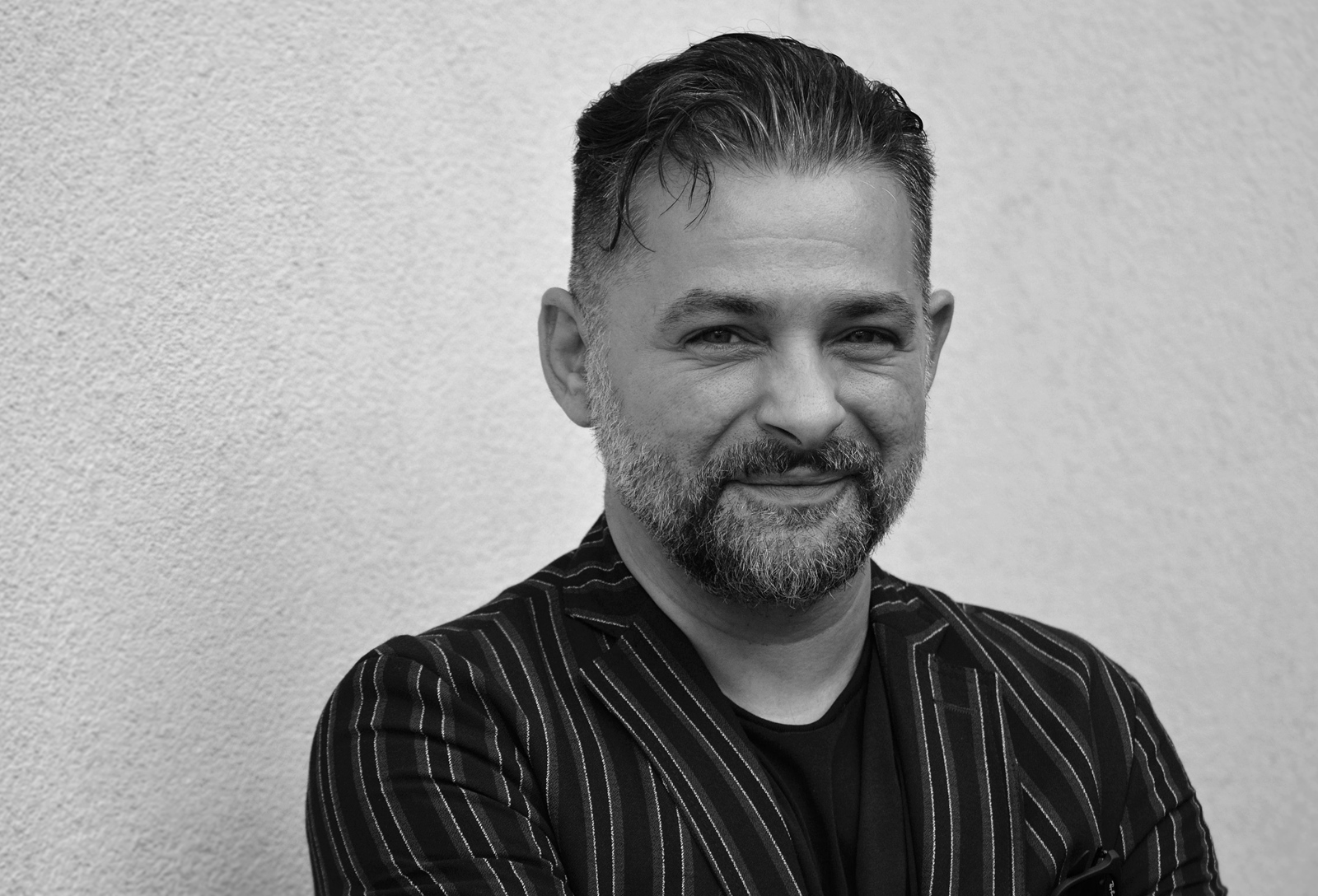 Lukács Miklós (Törökszentmiklós, 1977. január 9.) zenész, cimbalomművész.